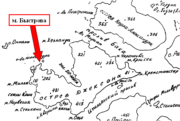 Карта острова Джексона.Карта-схема острова Джексона (архипелаг Земля Франца-Иосифа)) с указанием расположения мыса Быстрова.